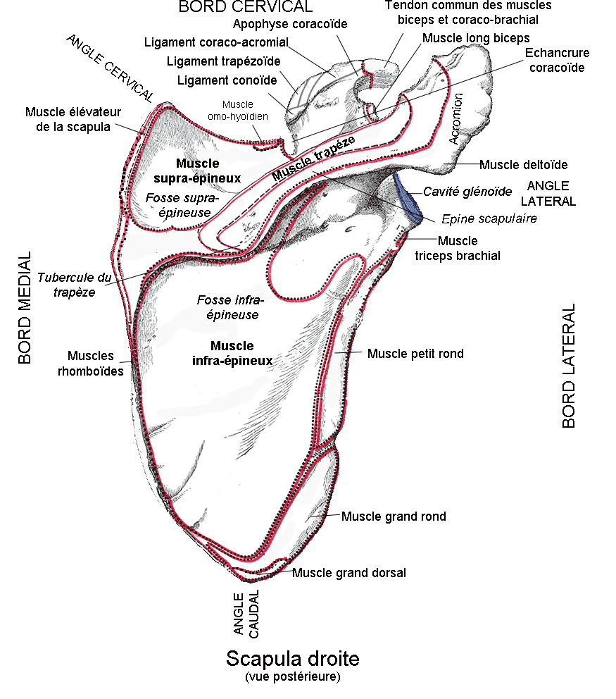 Scapula droite(Omoplate)Vue postérieure. Anatomie humaine